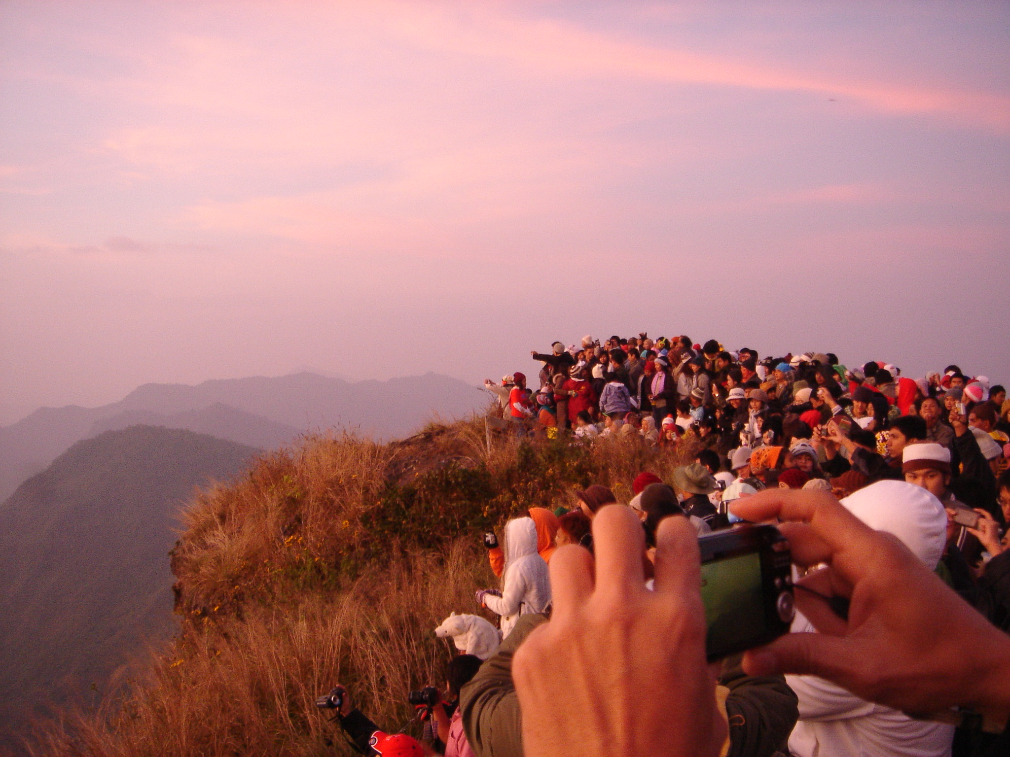 ผู้คนมากมายบนภูชี้ฟ้าช่วงวันหยุดสุดสัปดาห์วันรัฐธรรมนูญ ปีพ.ศ.2552